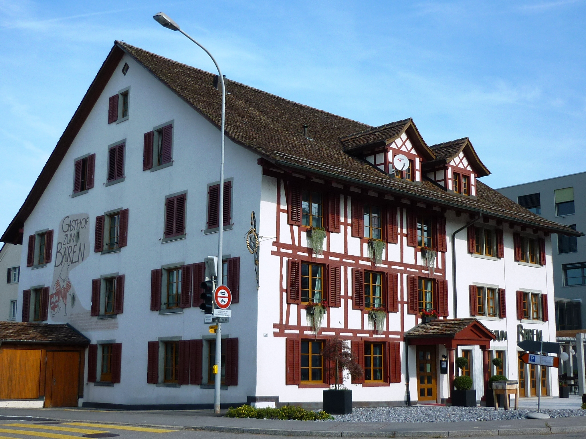 Gasthof Bären Nürensdorf, erwähnt 1474